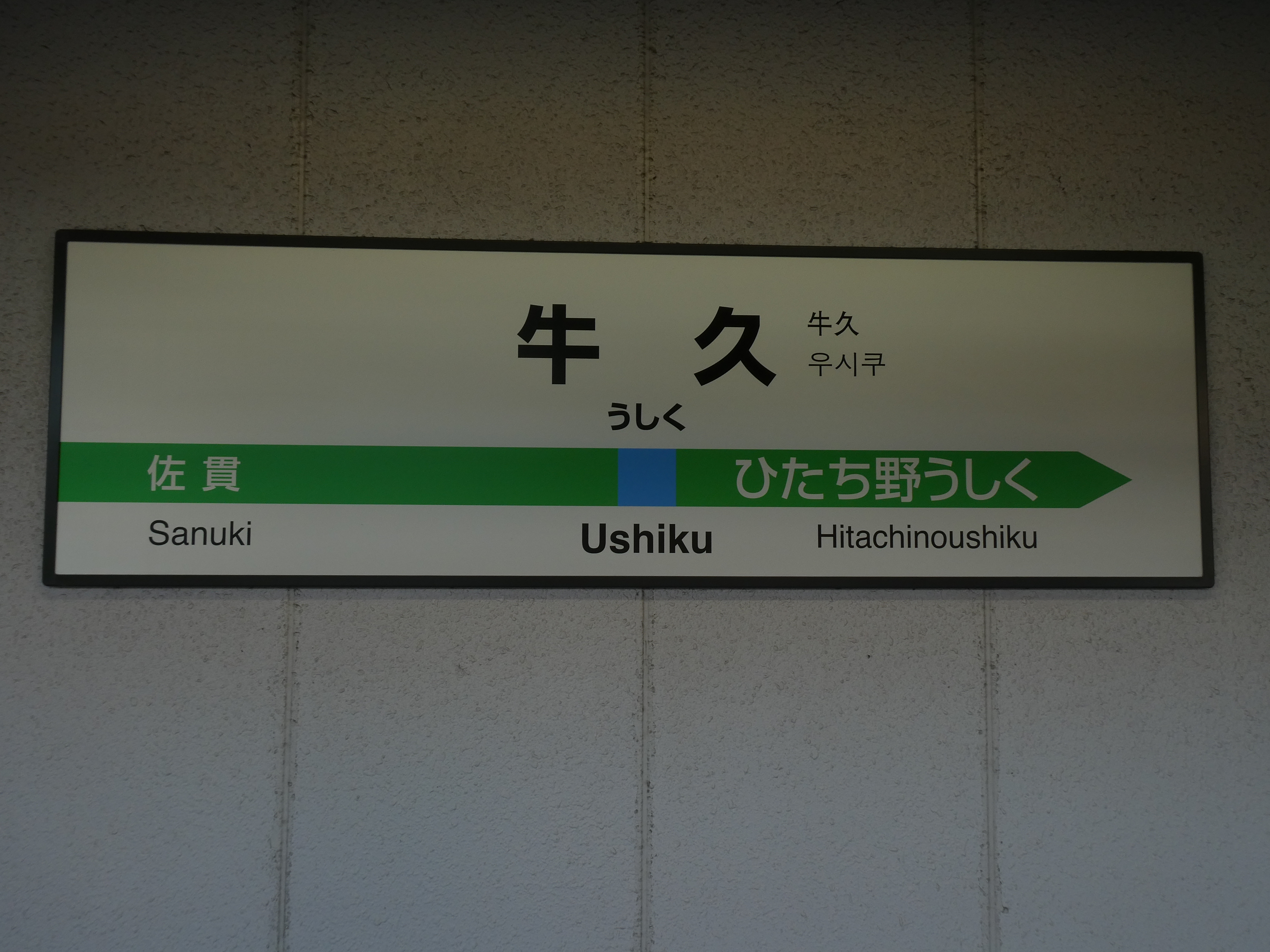 牛久駅の駅名看板です